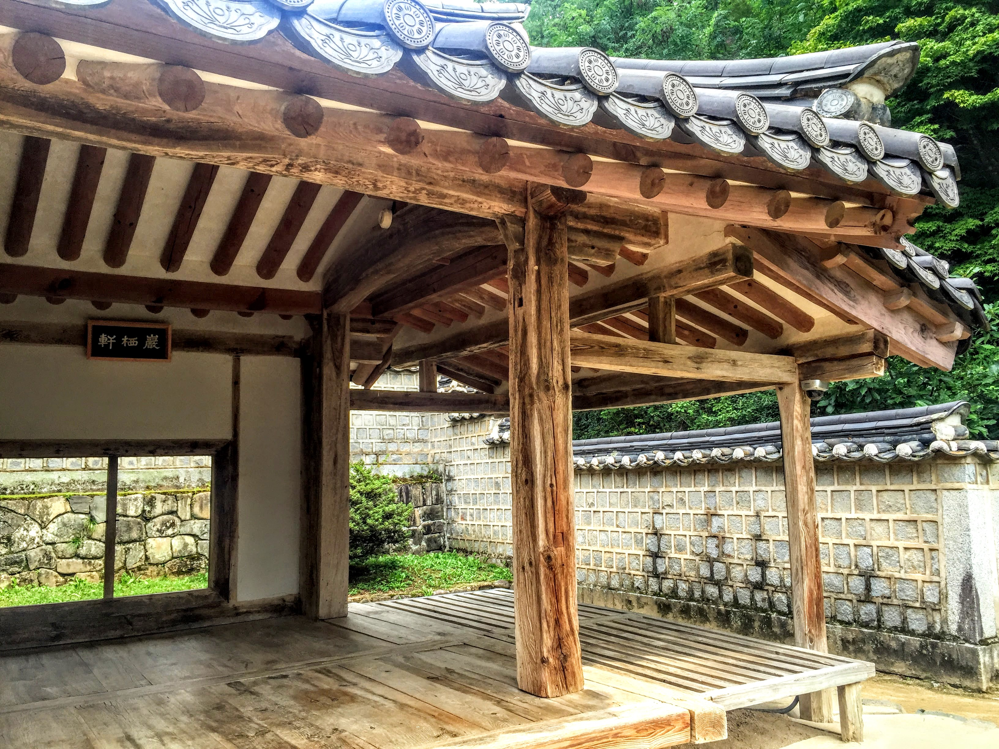 도산서원 마루